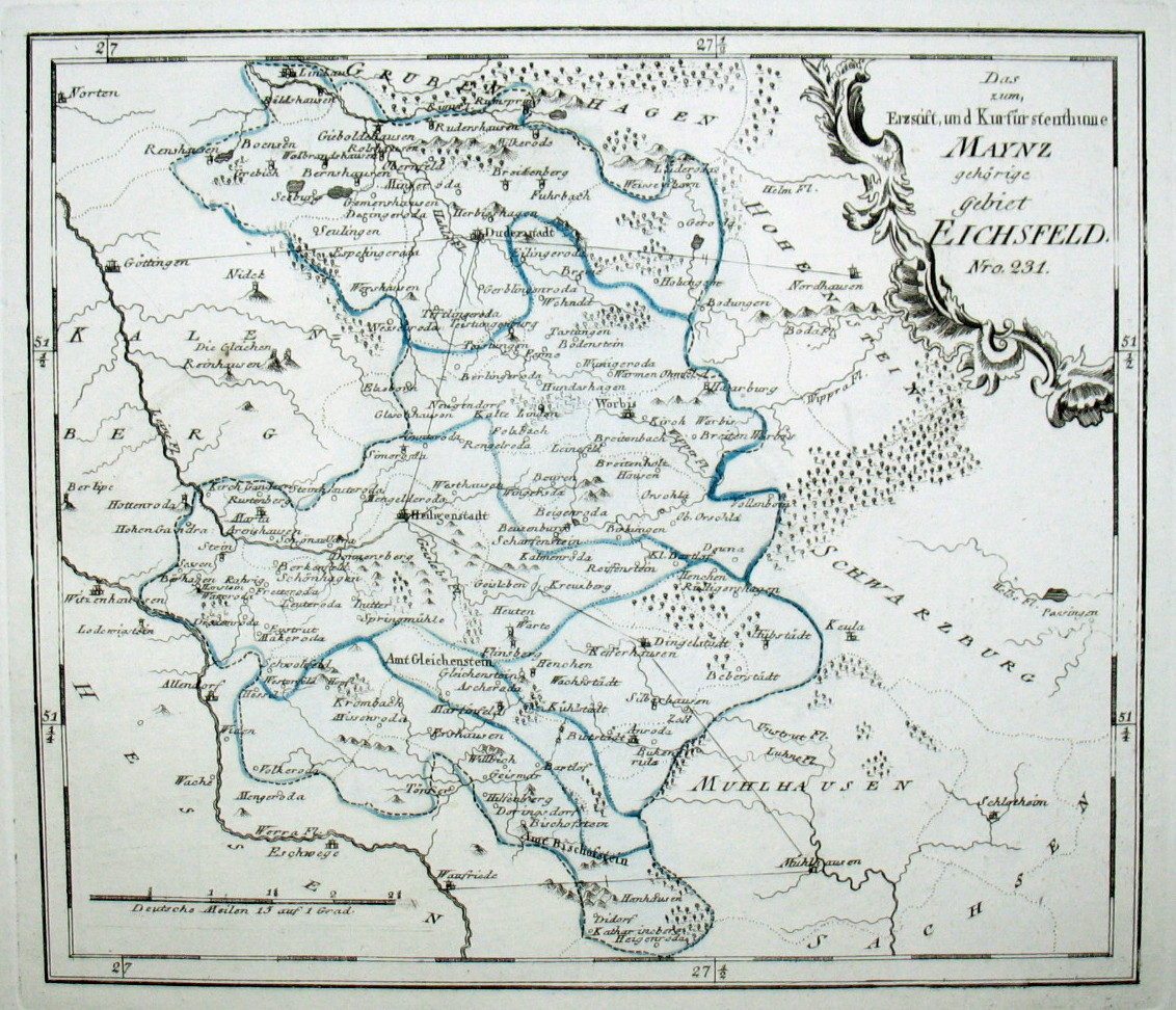 Das zum Erzstift, und Kurfürstenthume Maynz gehörige Gebiet Eichsfeld. Nro. 231. Kolorierter Kupferstich